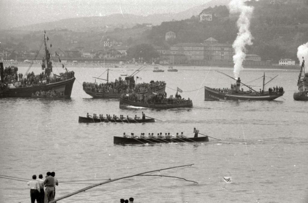 Título original: Regatas de traineras en la bahía de la Concha (123/127) Localización: San Sebastián (Guipúzcoa)